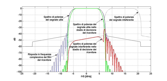 Esempio di stima delle potenze utile ed interferente per la stima di NFD di un ricevitore radio